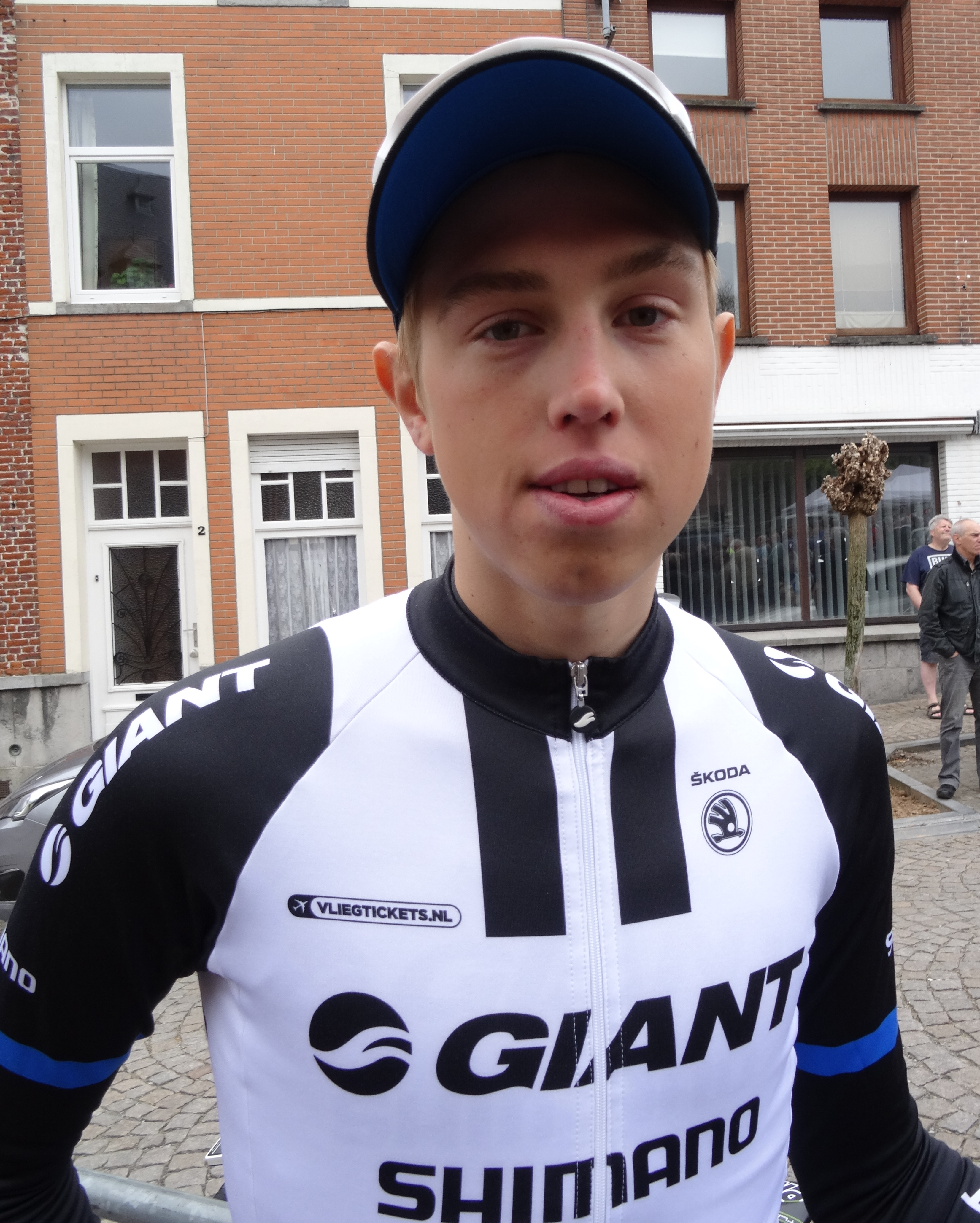 Triptyque des Monts et Châteaux 2014, étape 1, 4 avril 2014, départ d'Antoing. Depicted person: Fredrik Ludvigsson Depicted team: Giant-Shimano Development The creation of these files was made possible thanks to the organizers of the Triptyque des Monts et Châteaux 2014 English | français | +/−